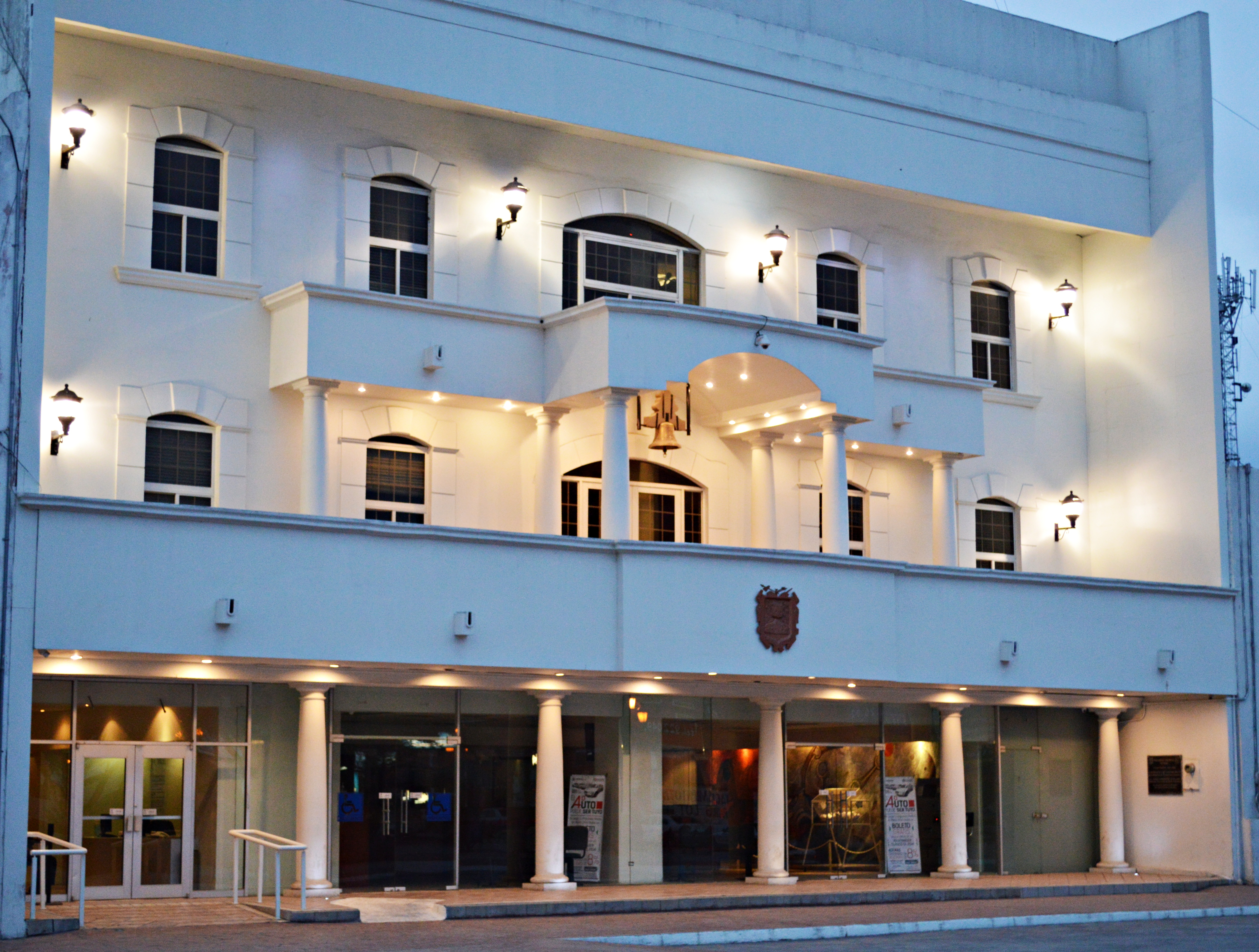 En ésta, nuestro Presidente Municipal, atiende los asuntos relacionados a la ciudad.